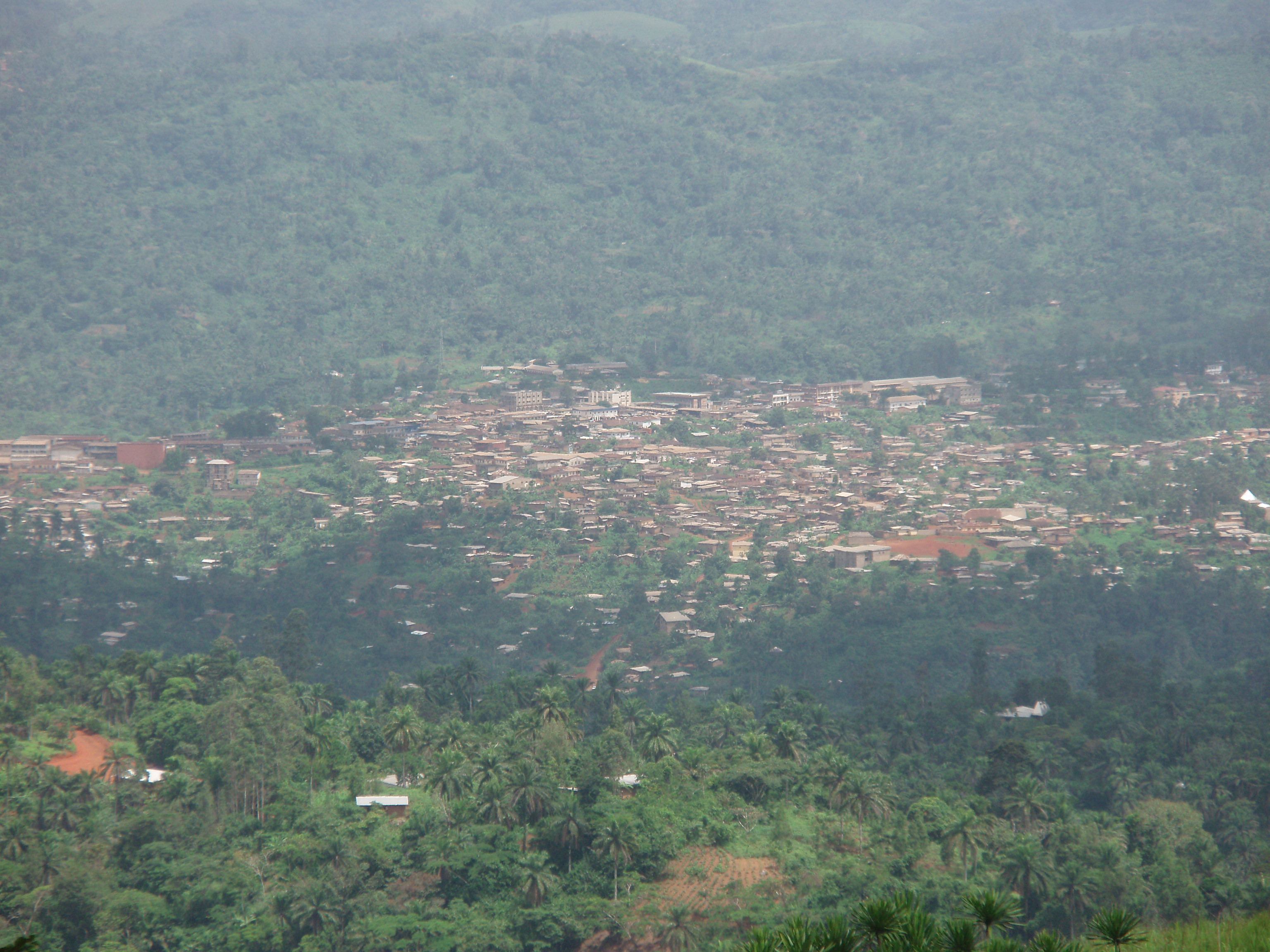 Vue de Bafang